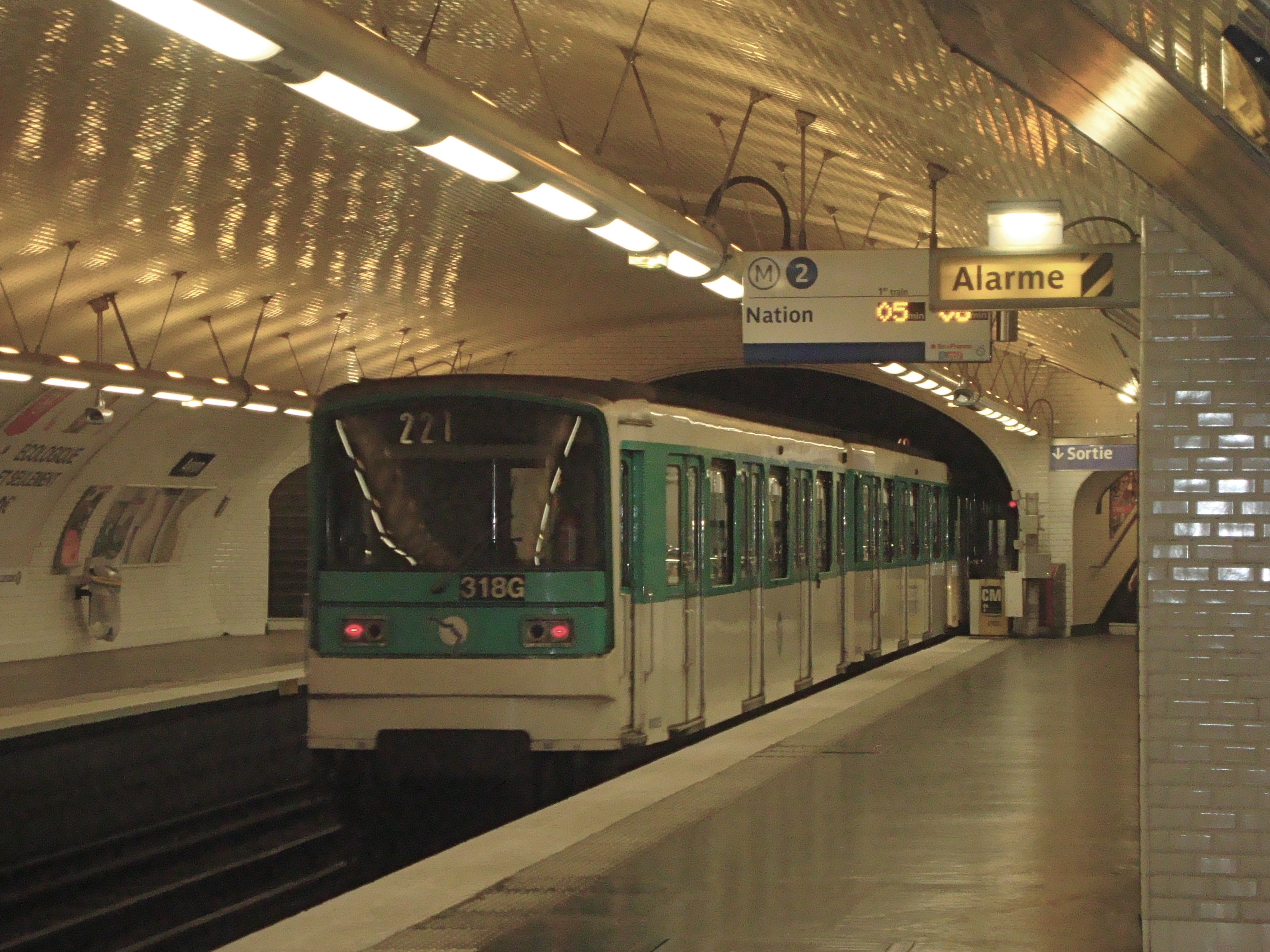 Quais de la station Avron sur la ligne 2 du métro de Paris